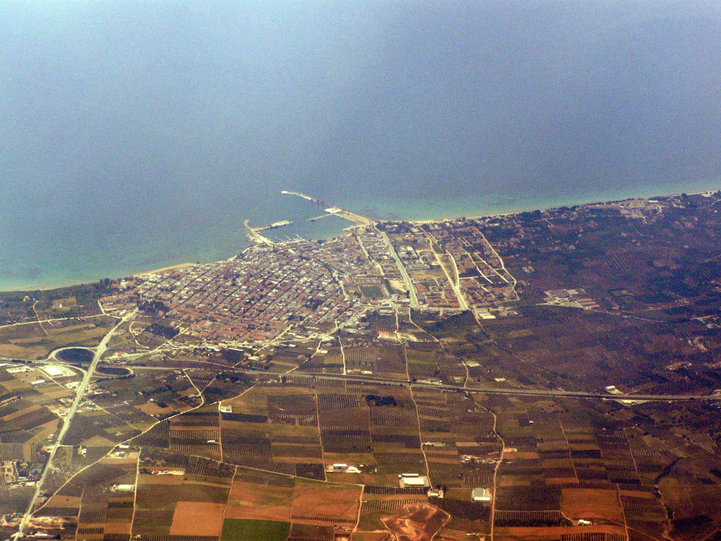 Αεροφωτογραφία Νέων Μουδανιών